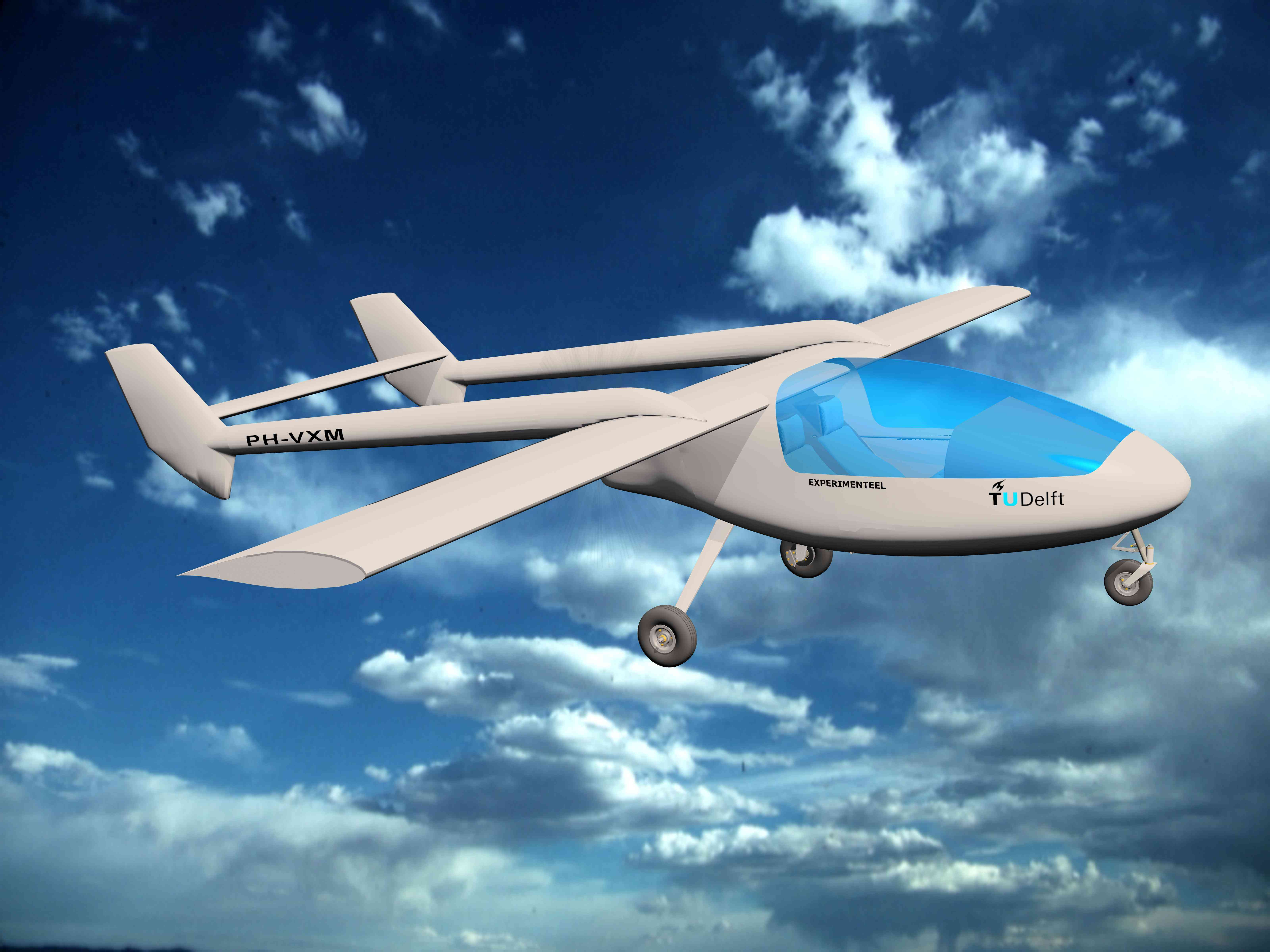 Artist Impresison van de Impuls; Vrij voor gebruik op Wikipedia; upload door auteur